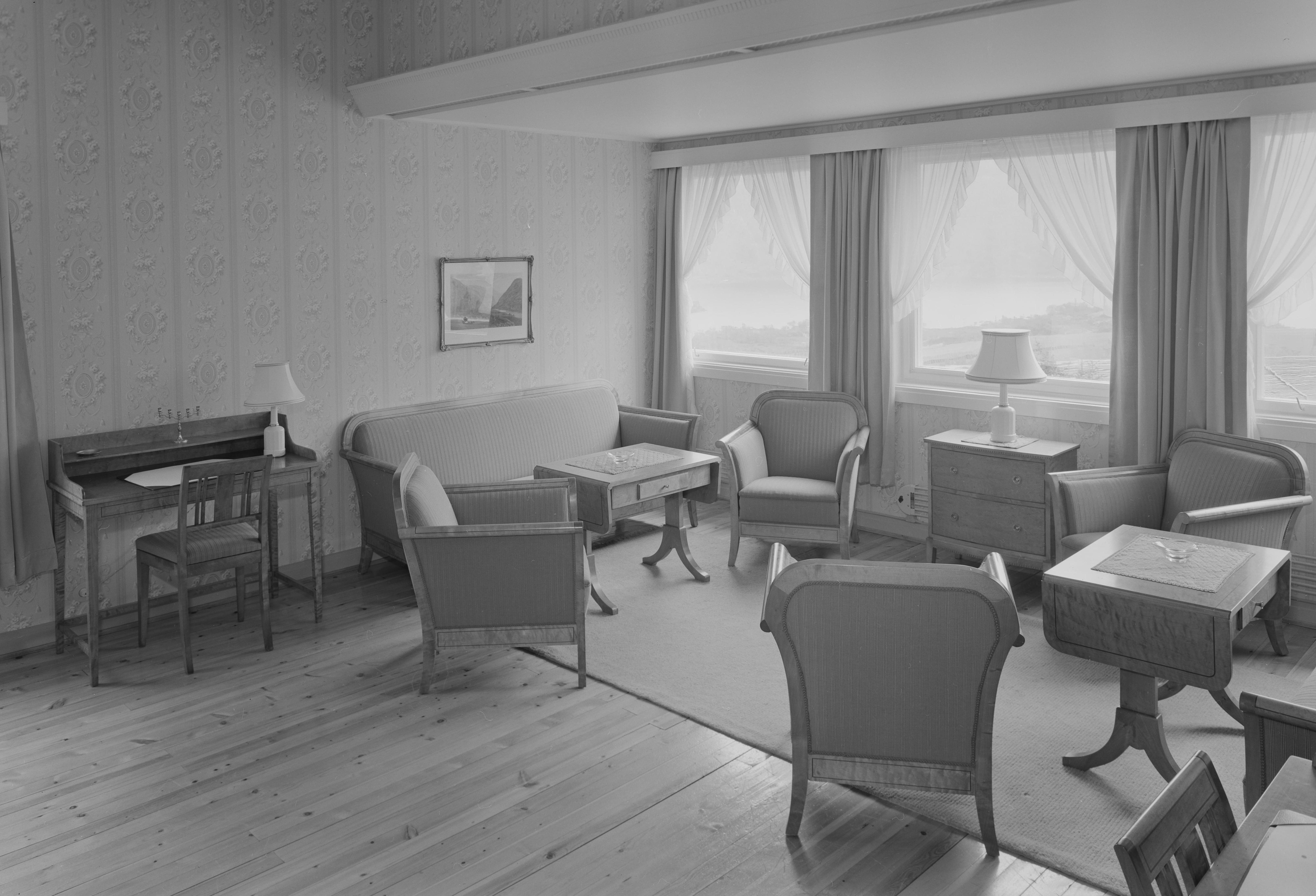 Bildet er hentet fra Nasjonalbibliotekets bildesamling. Anmerkninger til bildet var: Fotograf : ukjent Vatnahalsen, Aurland, Sogn og Fjordane